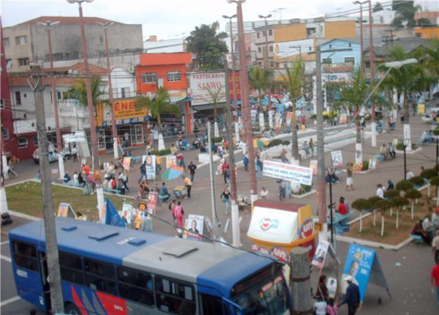 Ferraz de Vasconcelos